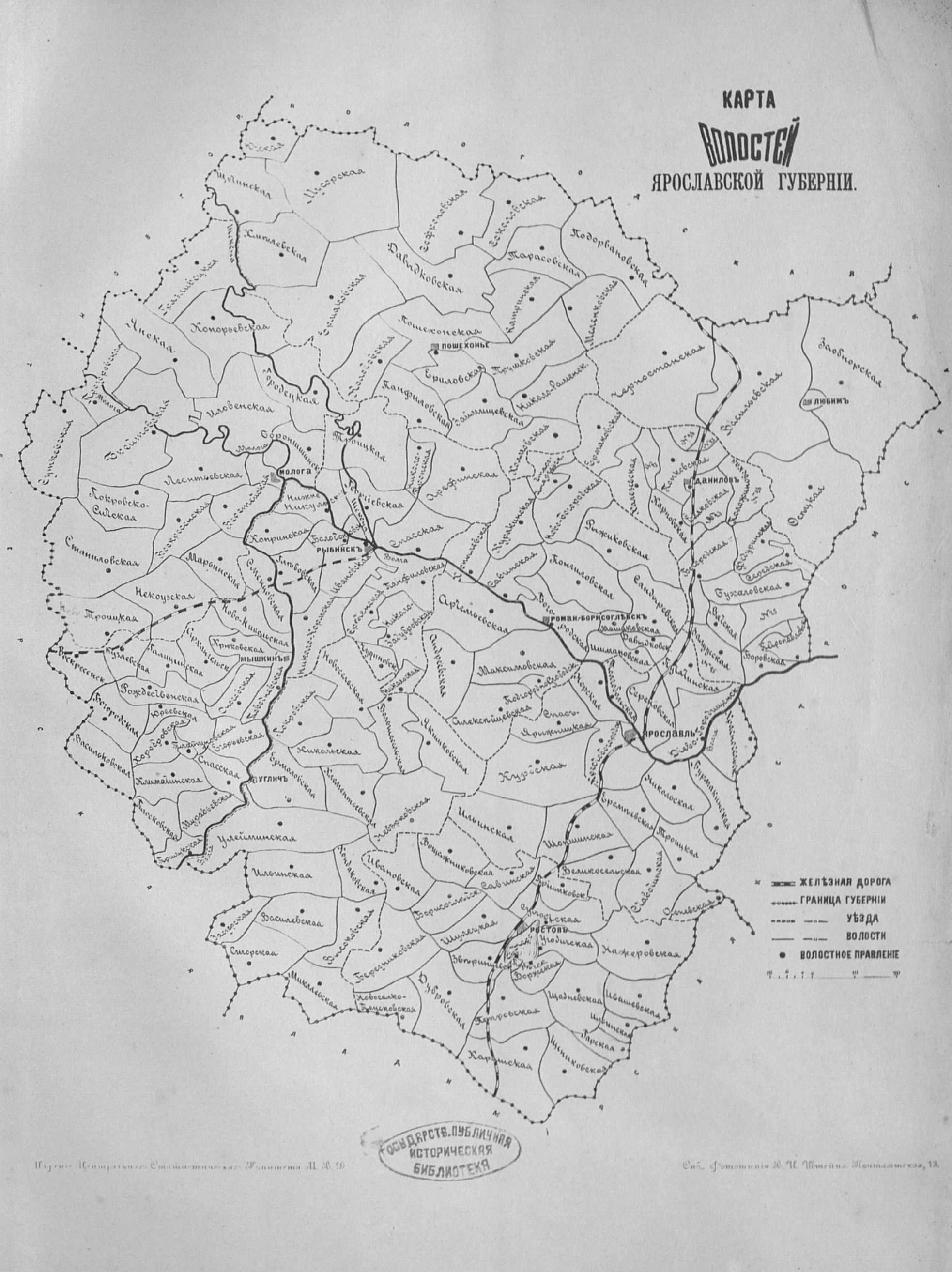 Карта волостей Ярославской губернии